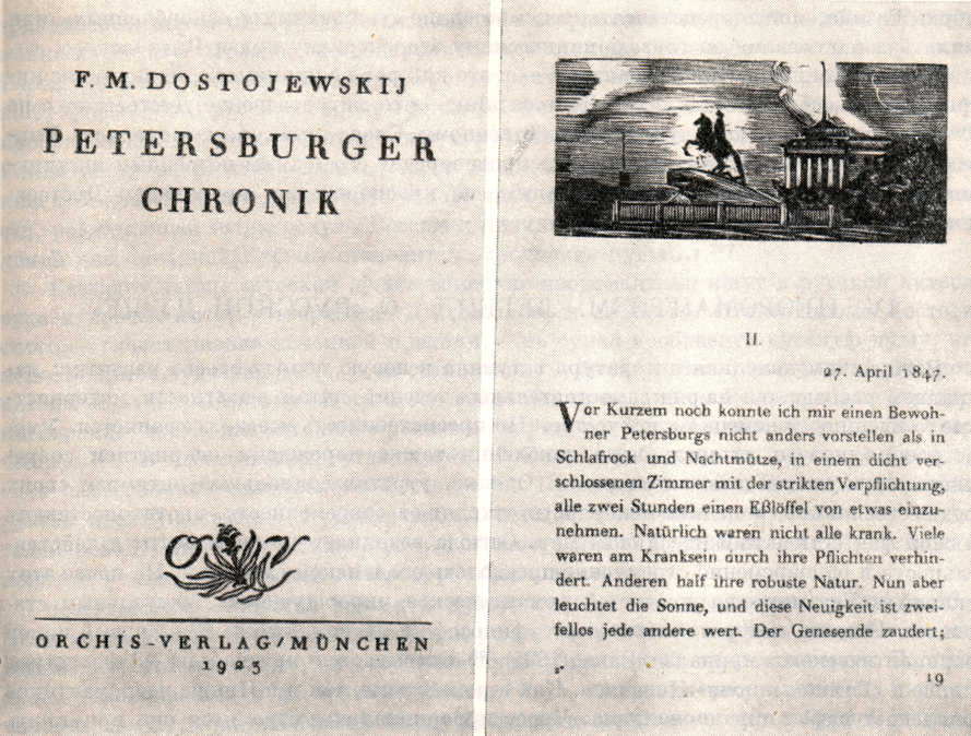 "Петербургская летопись", обложка и первая страница мюнхенского издания